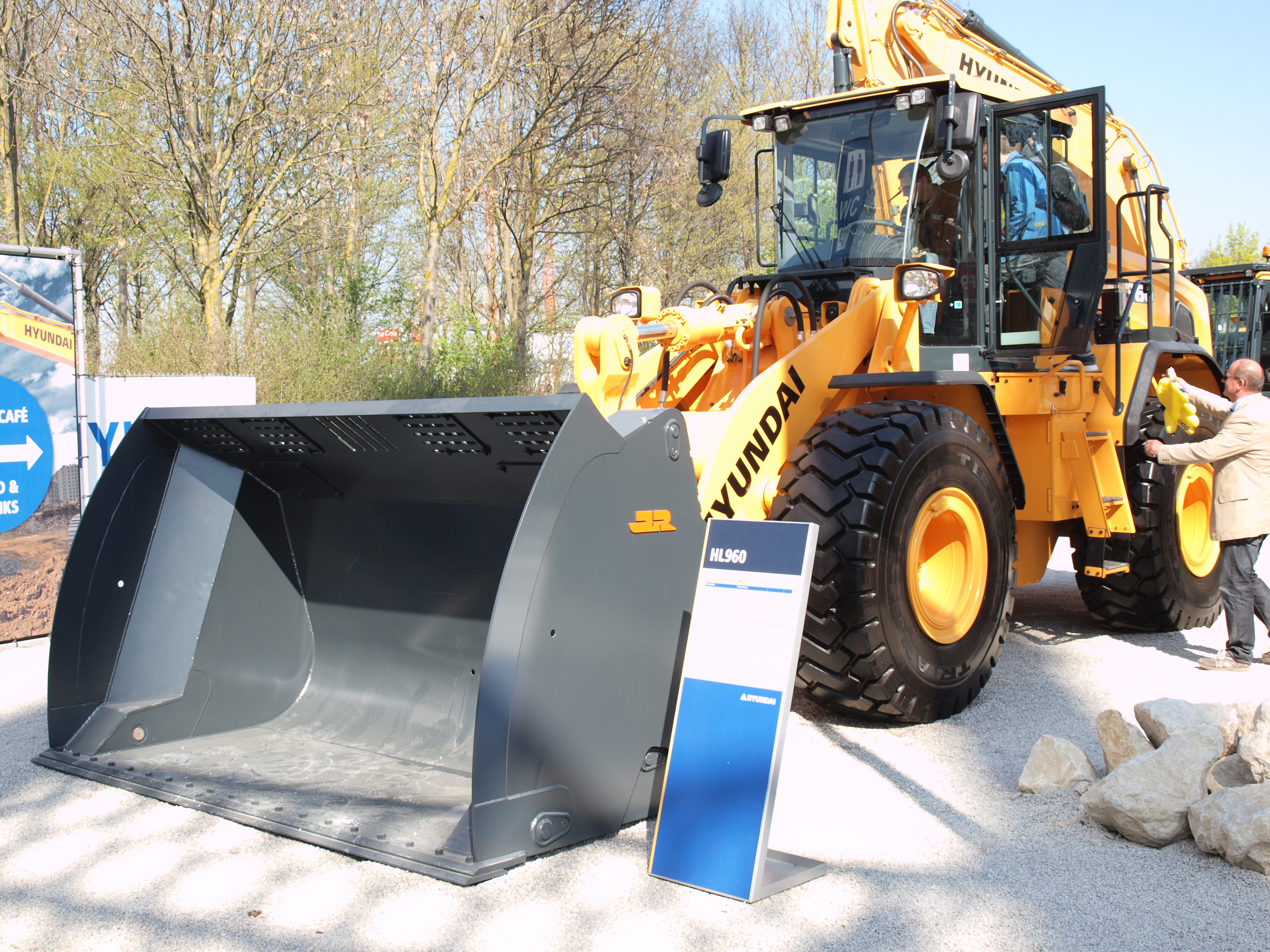 Hyundai Radlader HL960